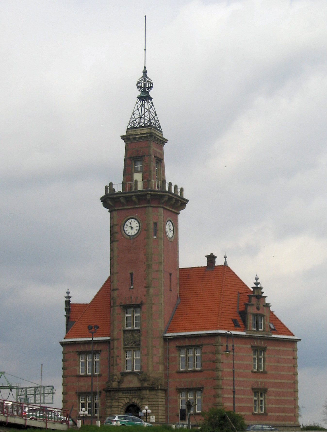 Altes Hafenamt Dortmund